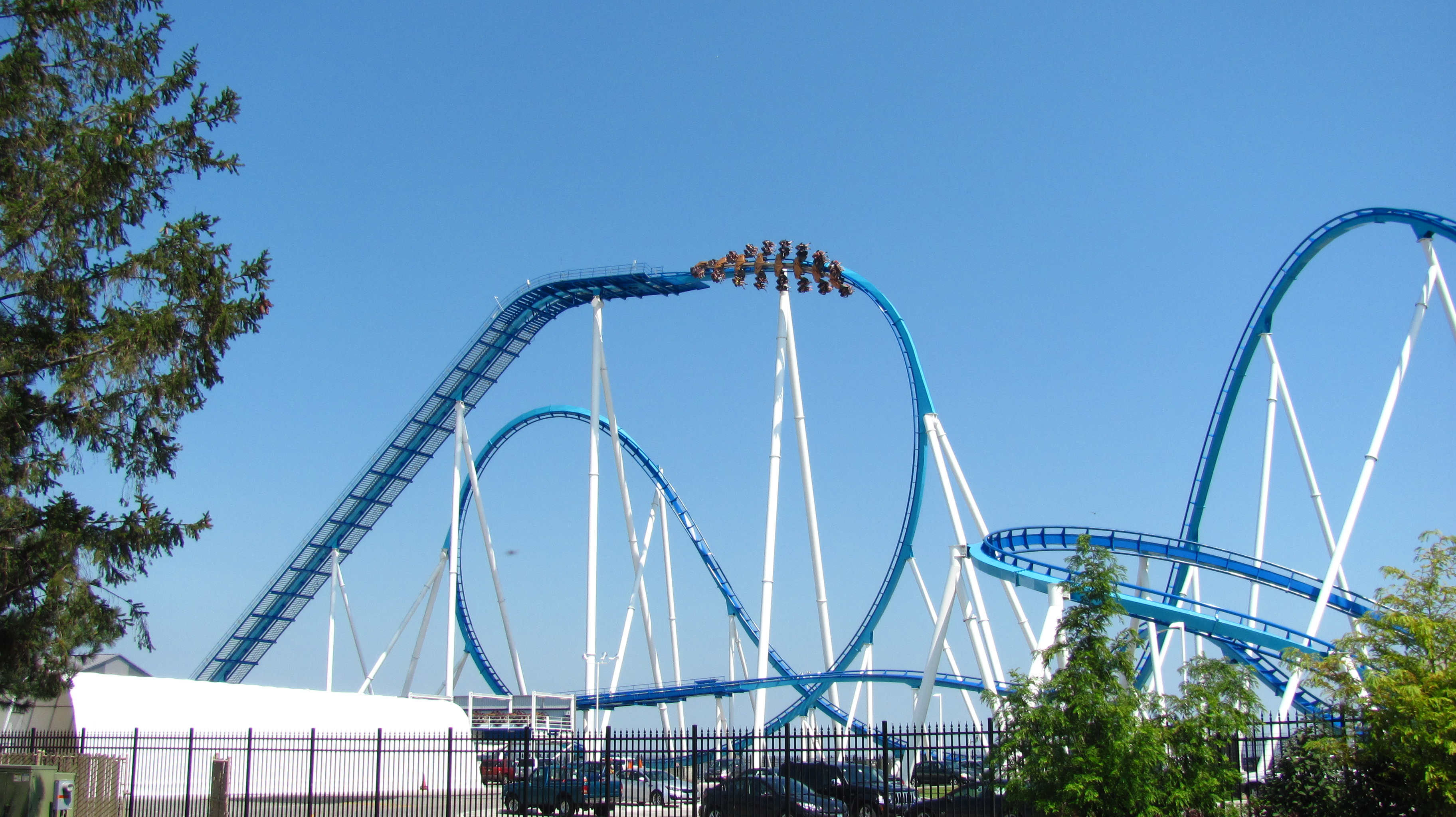 Cedar Point 036